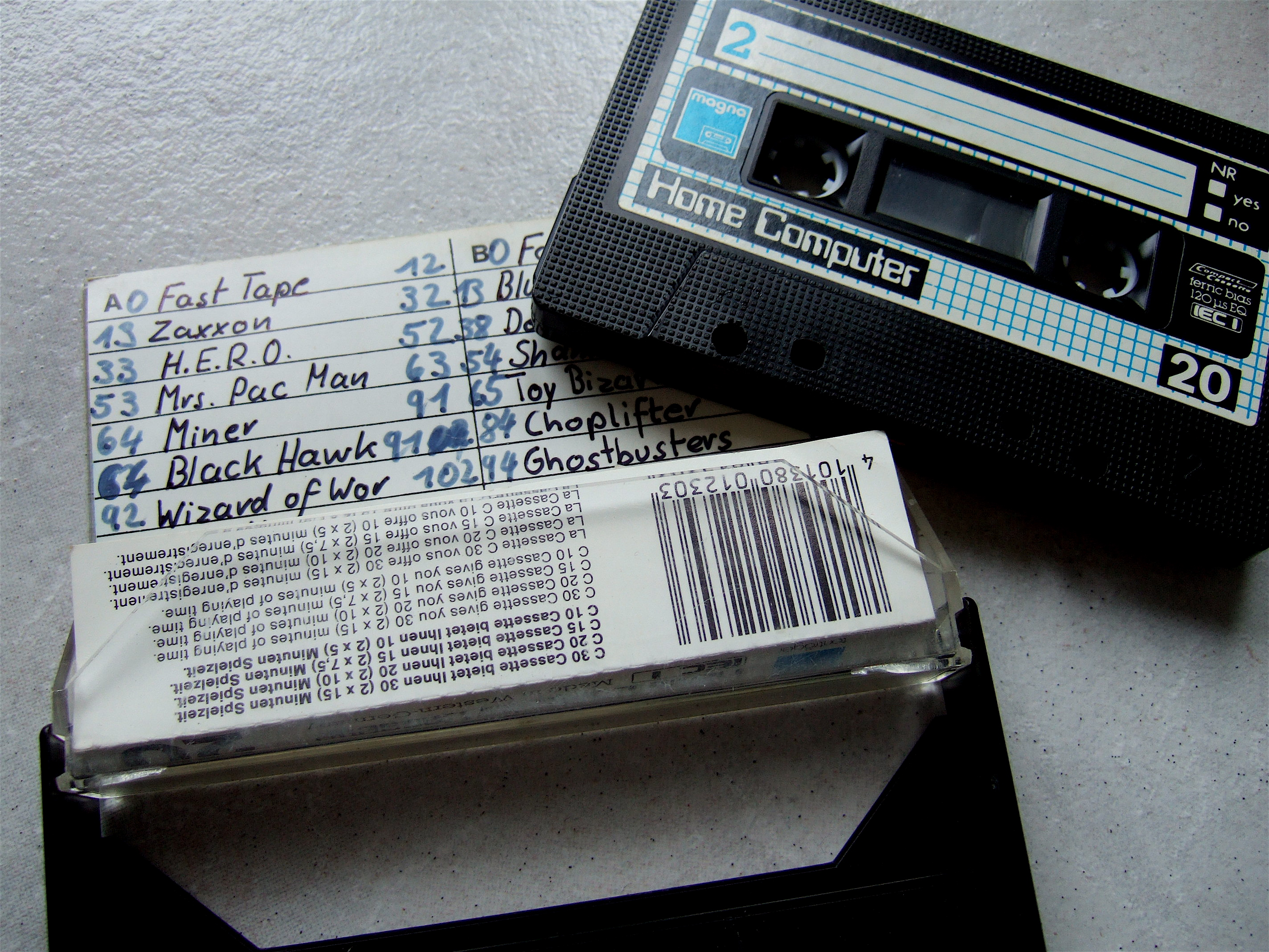 Cassettenhülle mit Computerspielen